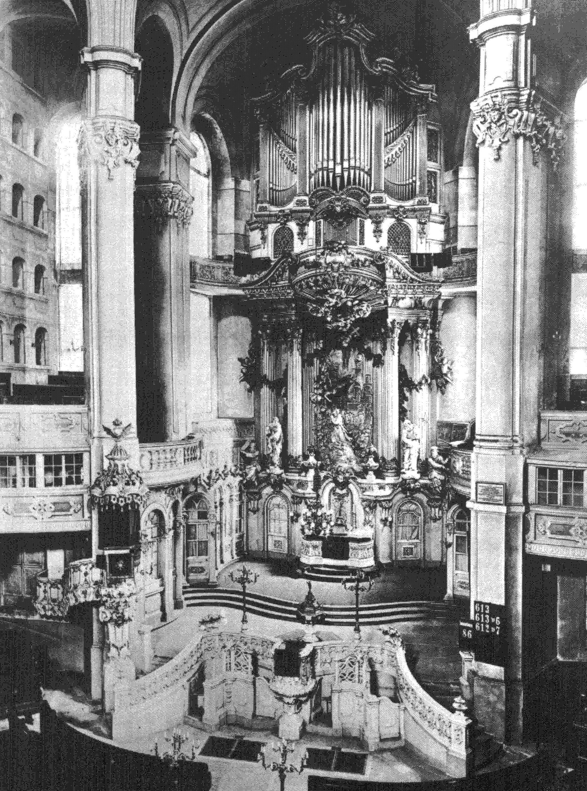 Altar und Orgel der Dresdner Frauenkirche im Jahr 1890